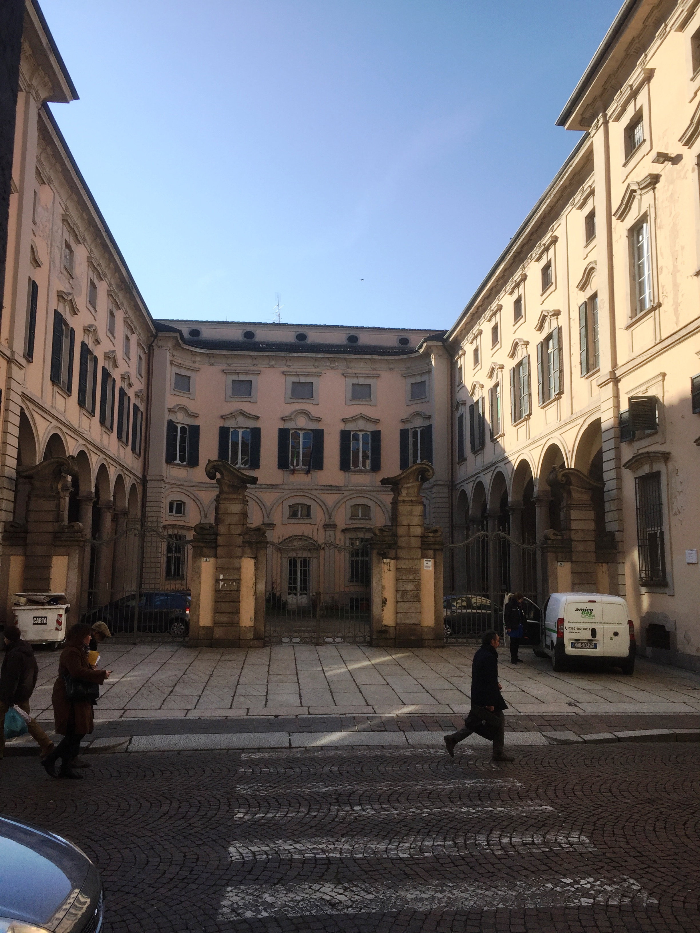 Pavia, palazzo Olevano